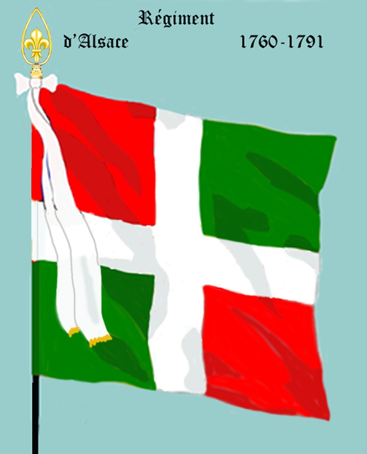 Ordonnanzfahne eines königlich französischen Fremden-Infanterieregiments. (Deutsches Regiment)- Entnommen und überarbeitet aus: „LES UNIFORMES ET LES DRAPEAUX DE L'ARMÉE DU ROI“ Marseille 1899. (Drapeau d'Ordonnance d'un régiment française d'infanterie royale. (Régiment etrangéré allemande.)